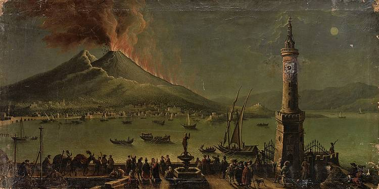 Italienischer Maler des 18. Jh.: Prospekt der Bucht von Neapel mit Vesuvausbruch, Öl auf Leinwand 58 x 116 cm